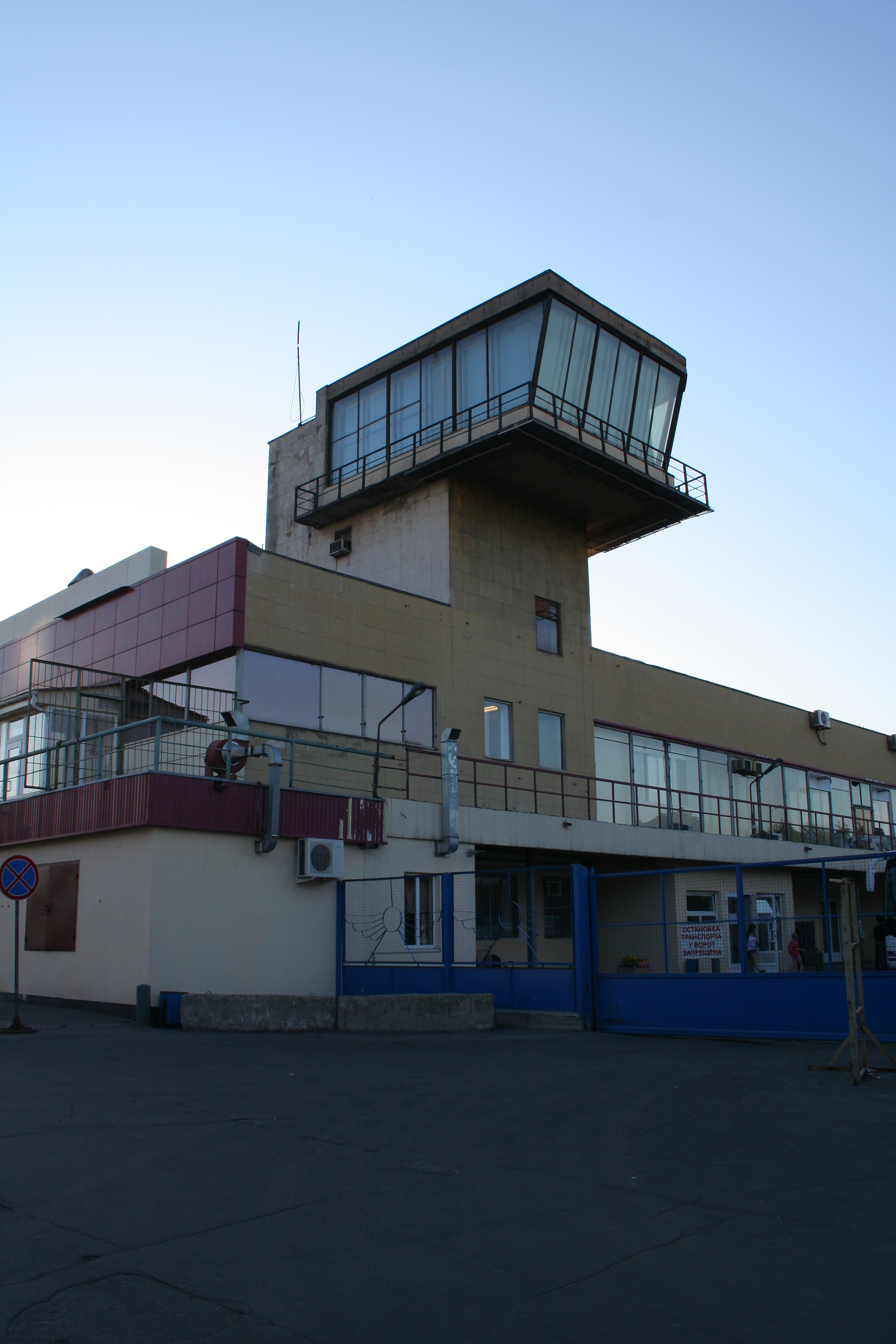 Ehemaliges Flughafenterminal auf dem Chodynka-Feld in Moskau. Der Tower.